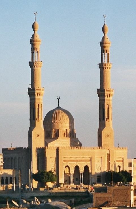 El-Tabia Mosque; Aswan, Egypt.